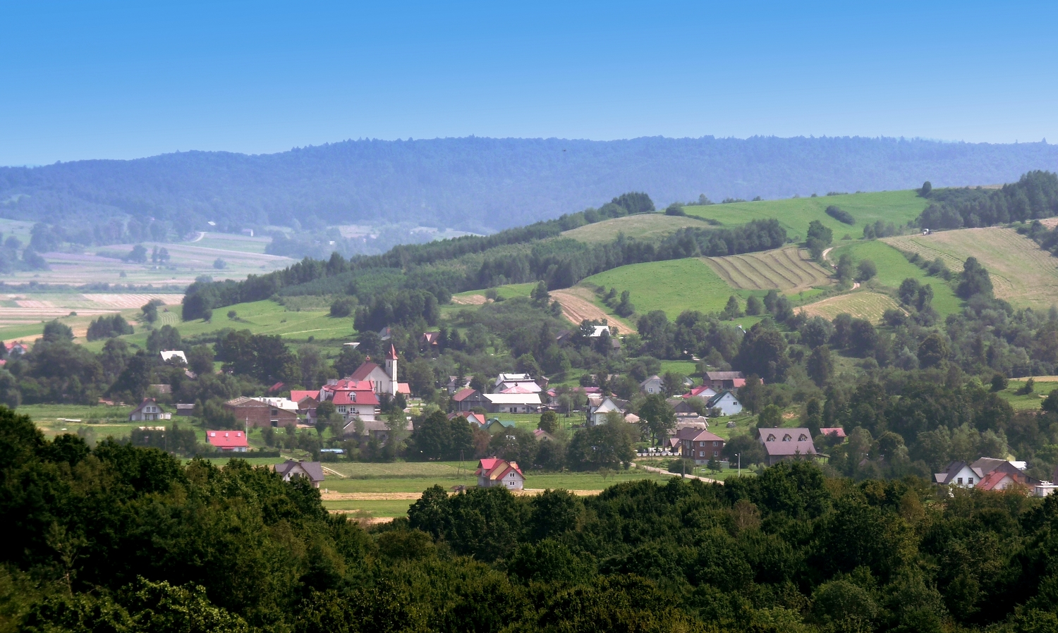 Panorama Pawłokomy z Winnej Góry w Dynowie